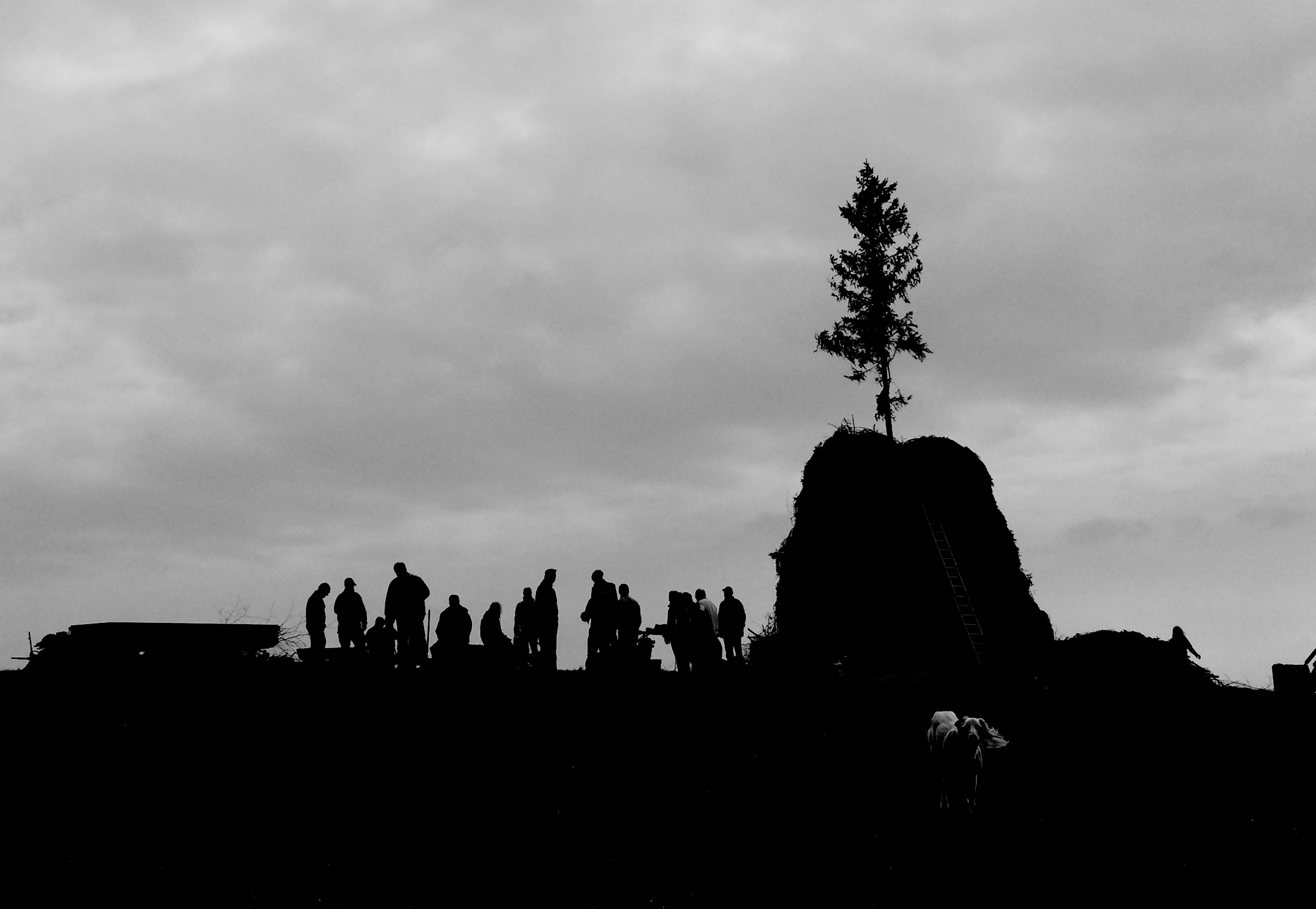 Beim Aufbau des Osterfeuers in Sankt Andreasberg